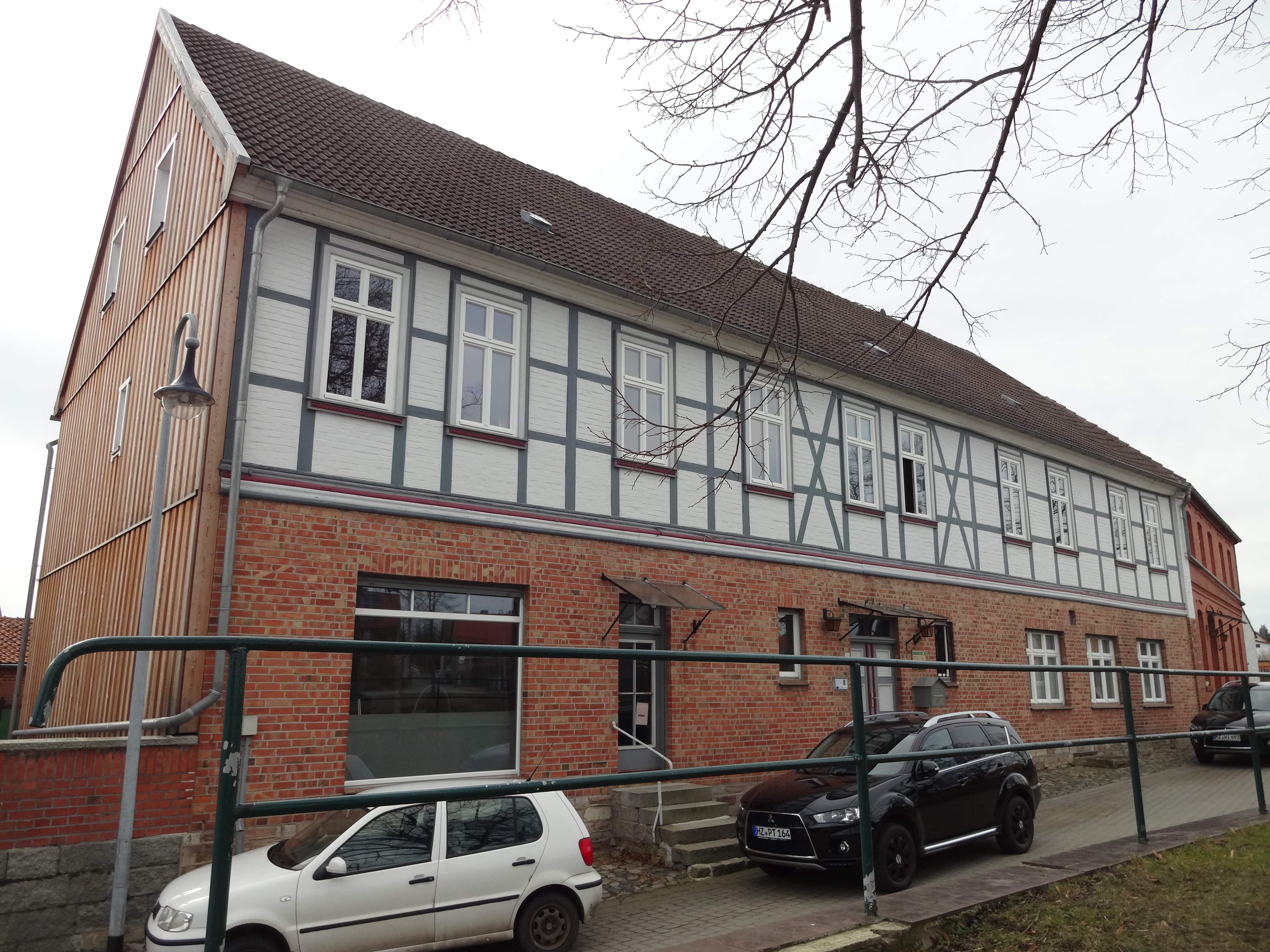 Kulturdenkmal in Minsleben, Ortsteil von Wernigerode